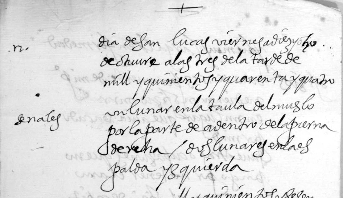 ACO, Bernardino, 1065